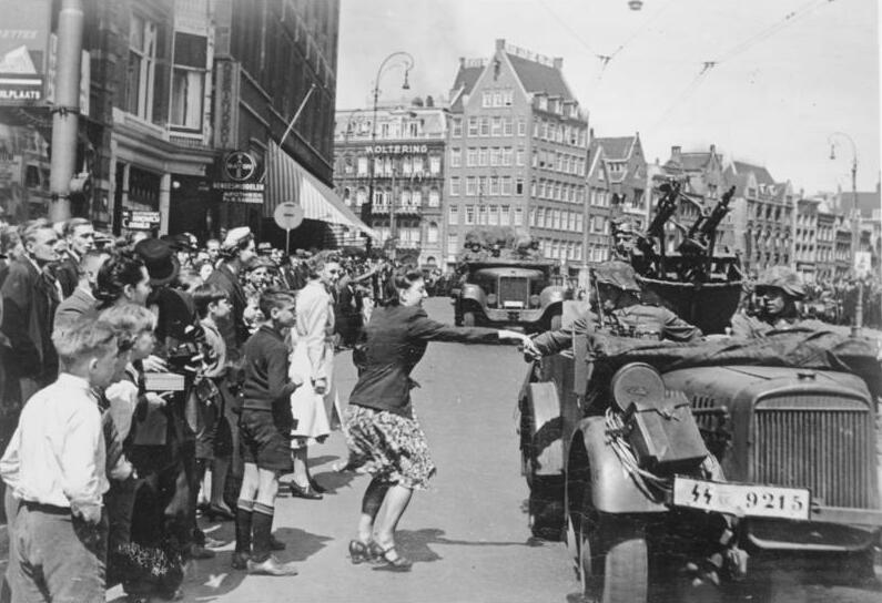 Amsterdam, Durchmarsch deutscher Truppen Krieg im Westen: Durchmarsch der deutschen Truppen durch Amsterdam. PK-Jäger- Scherl Bilderdienst Mai 1940 1207-41 Information added by Wikimedia users.German troops entry in Amsterdam (Dam Square, viewpoint Rokin)